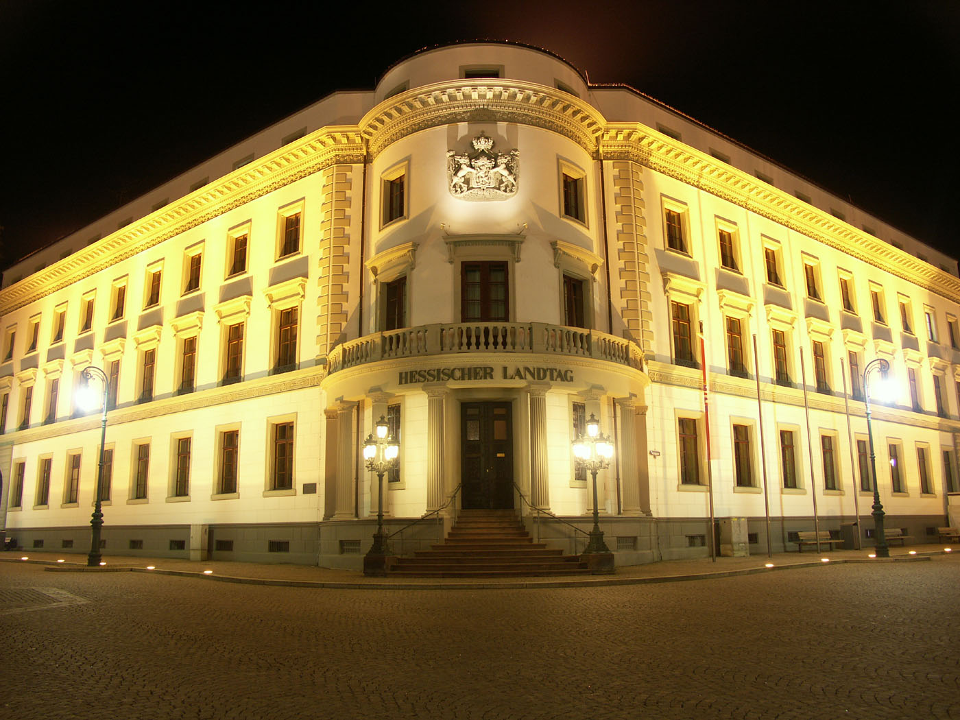 Stadtschloß Wiesbaden, heutiger Sitz des hessischen Landtages